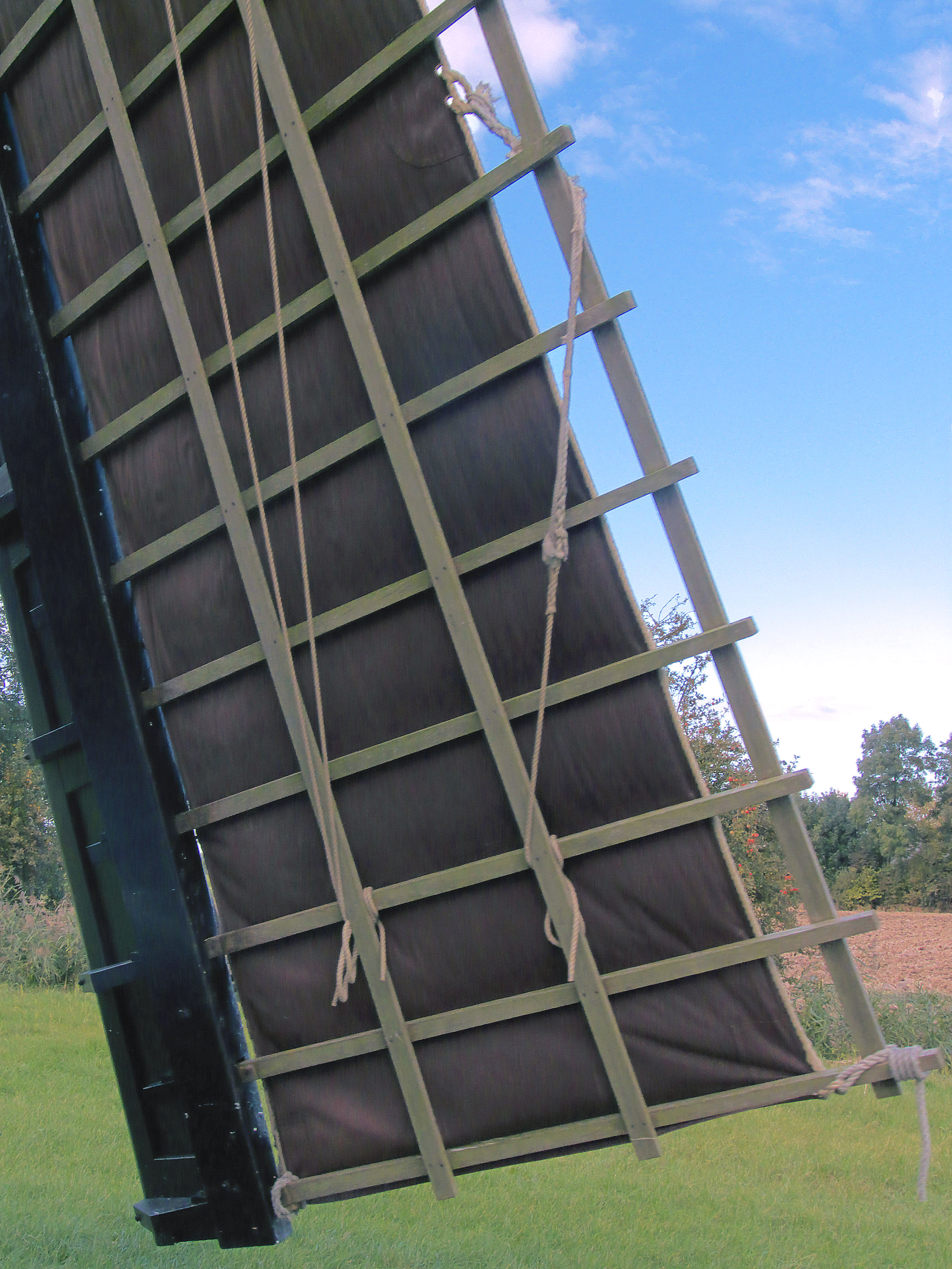 Zuidhollandse molen, Hank, wiek